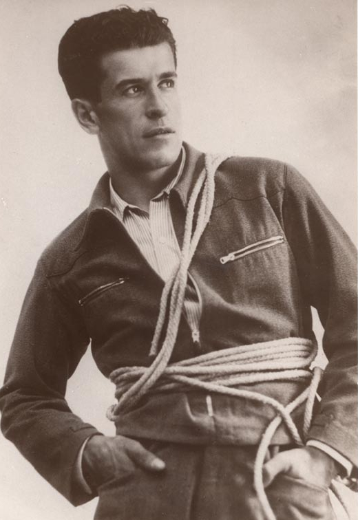 Ritratto di Raffaele Carlesso